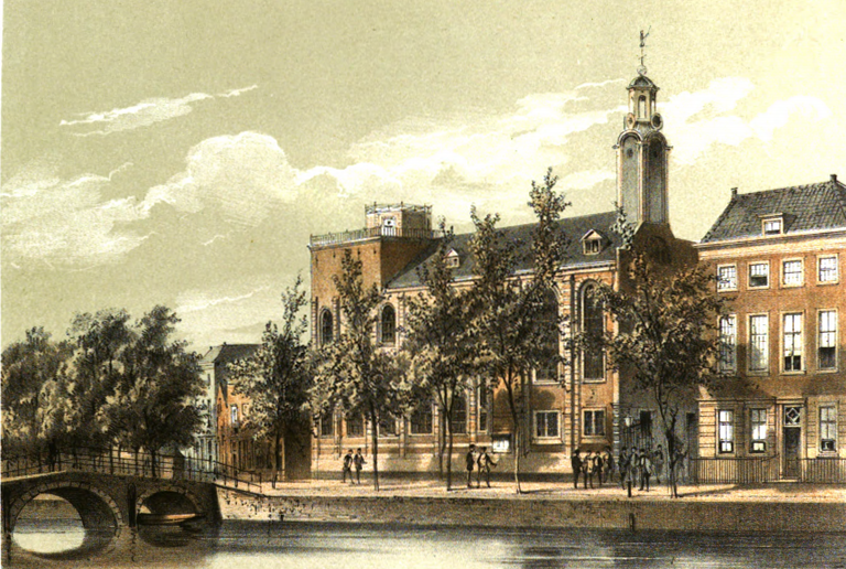 Illustratie gemaakt door Gerardus Johannes Bos voor het album De Stad Leiden : Album bevattende eenige afbeeldingen der voornaamste hoofdgebouwen en fraaiste gezigten in en nabij de stad Leiden. eerste Serie. Auteur: A Montagne; G J Bos; Uitgever: Leiden Couvée (1859).